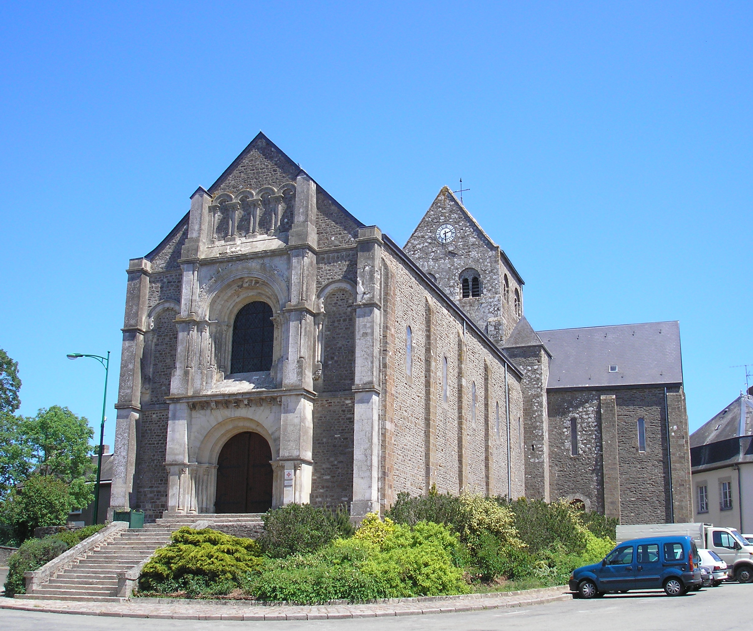 Javron-les-Chapelles (Pays de la Loire, France). L'église Saint-Jean-Baptiste.